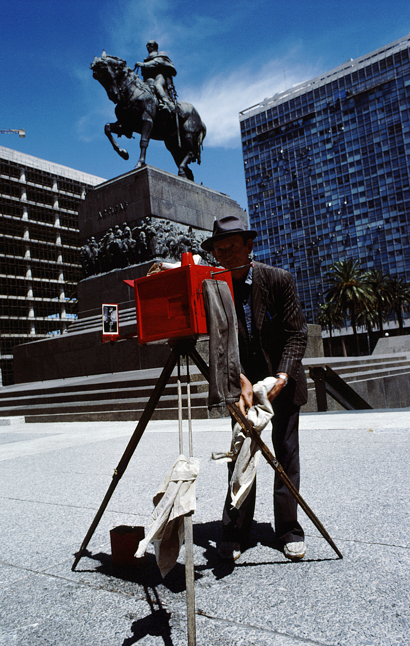 Fotógrafo en la Plaza Independencia en Montevideo, Uruguay. A la izquierda se aprecia la estructura inacabada del Palacio de Justicia (actualmente Torre Ejecutiva); al centro, el monumento al prócer José Gervasio Artigas; a la derecha, el Edificio Ciuidadela.